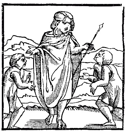 Первое европейское изображение правителя Инков, 1553